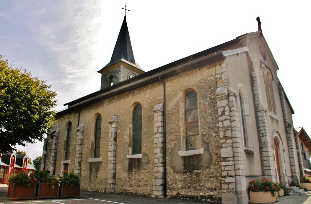 église St Blaise